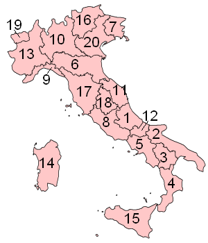 thumb|left|Soortgelijke afb. op Commons maar soms met ander getal!